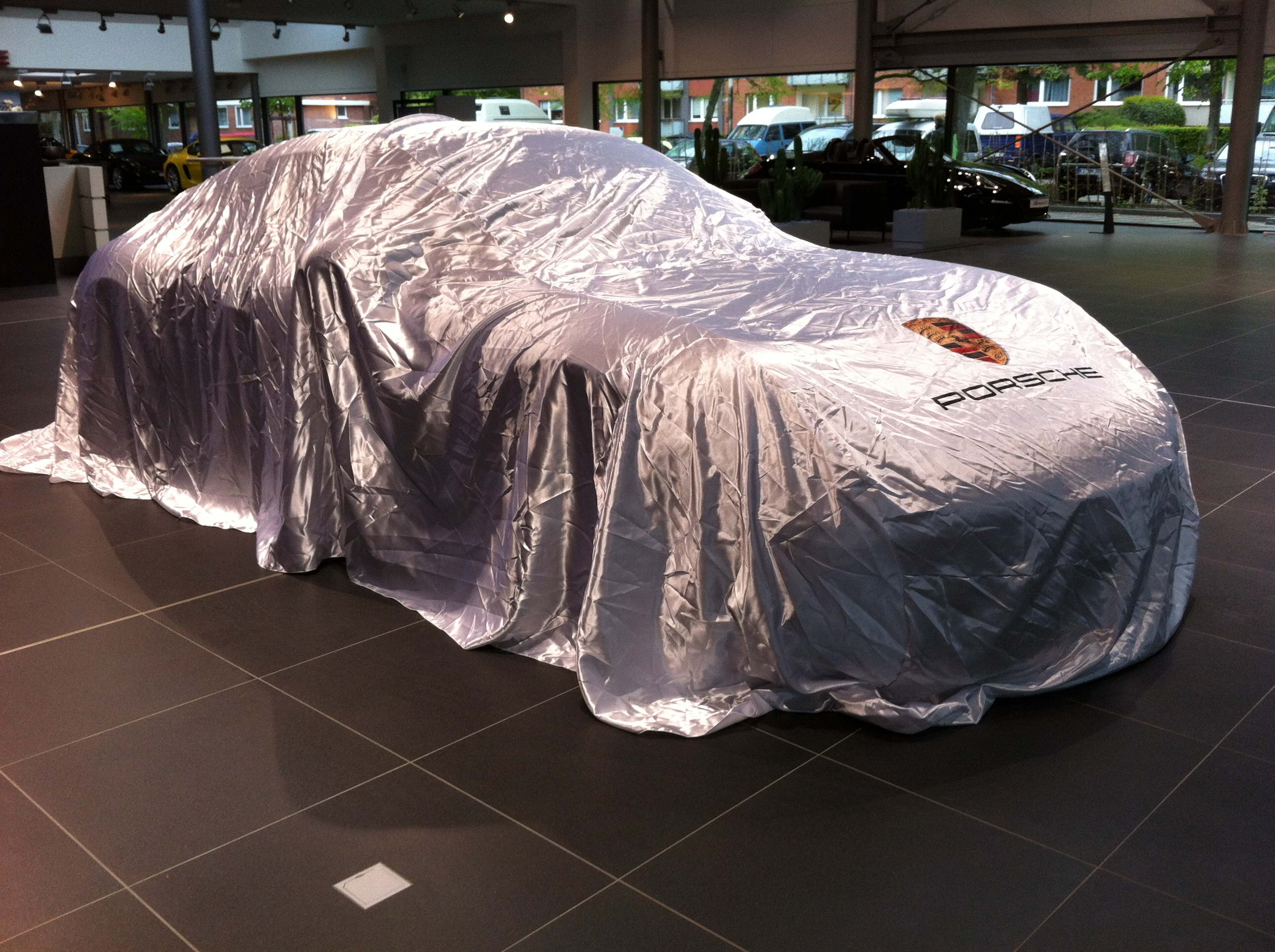 PKW-Plane